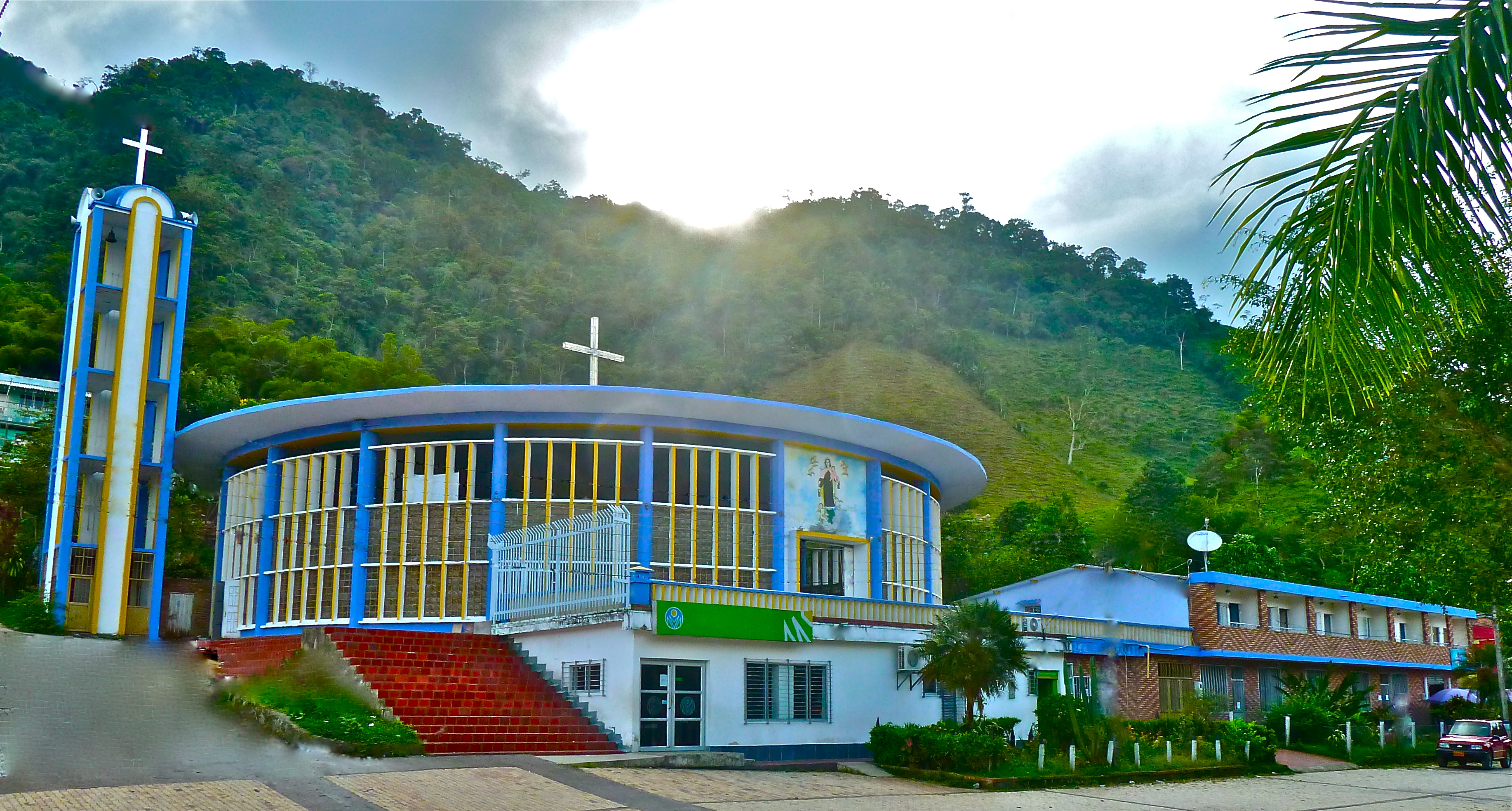 Iglesia de Otanche, Boyacá